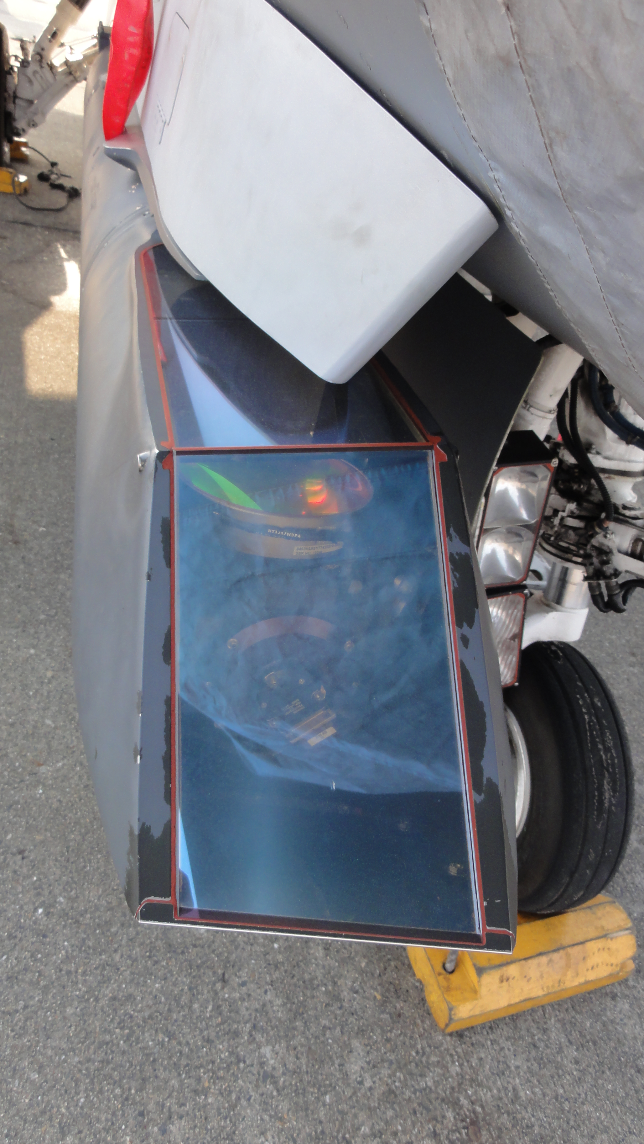 AN/AAQ-33 Sniper XRターゲティングポッド先端センサー部、2012年5月5日岩国基地にて。